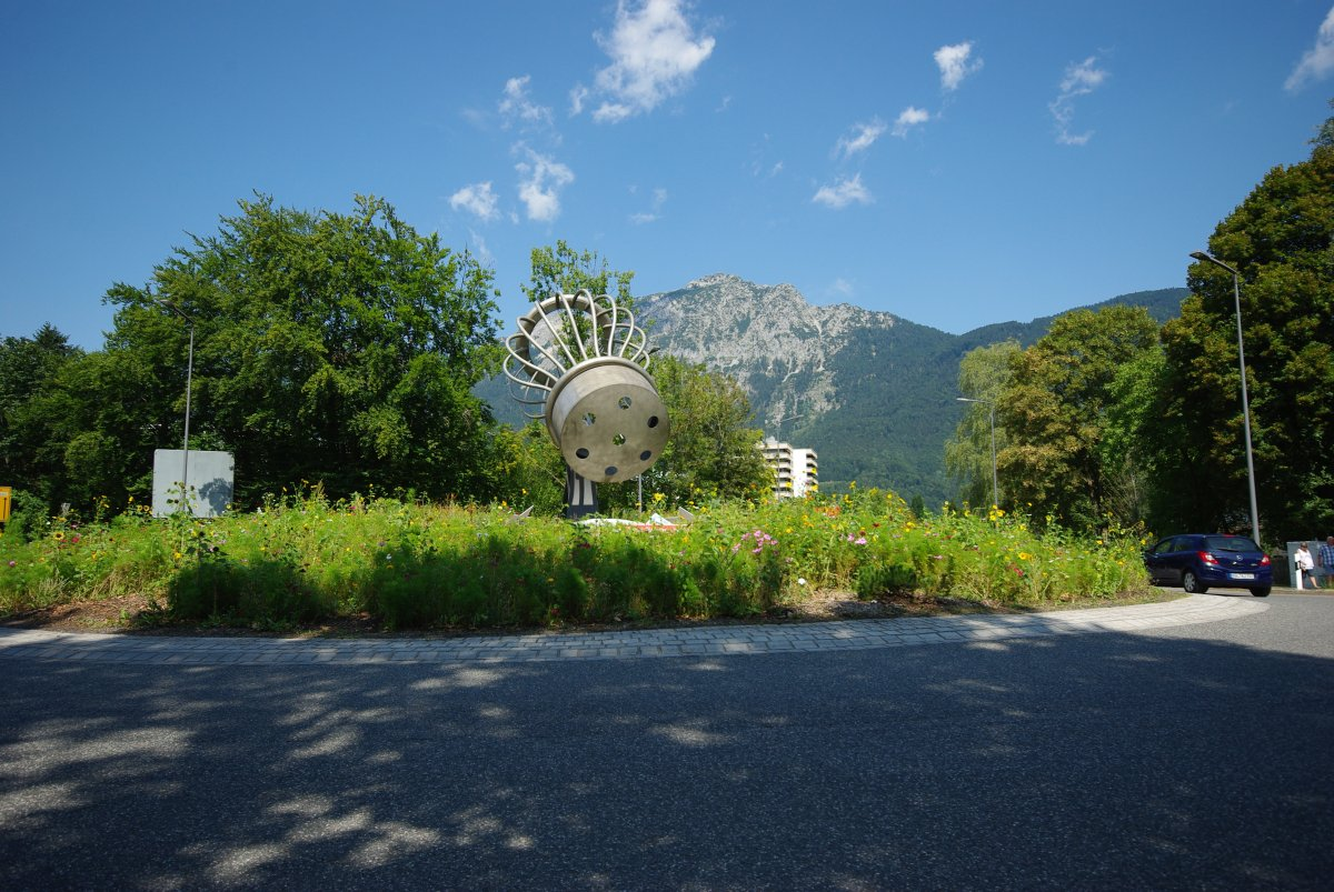 Kreisverkehr an der Reichenbachstraße in Bad Reichenhall. Skulptur eines Salzstreuers in direkter Nachbarschaft der Neuen Saline. Wildblumenwiese